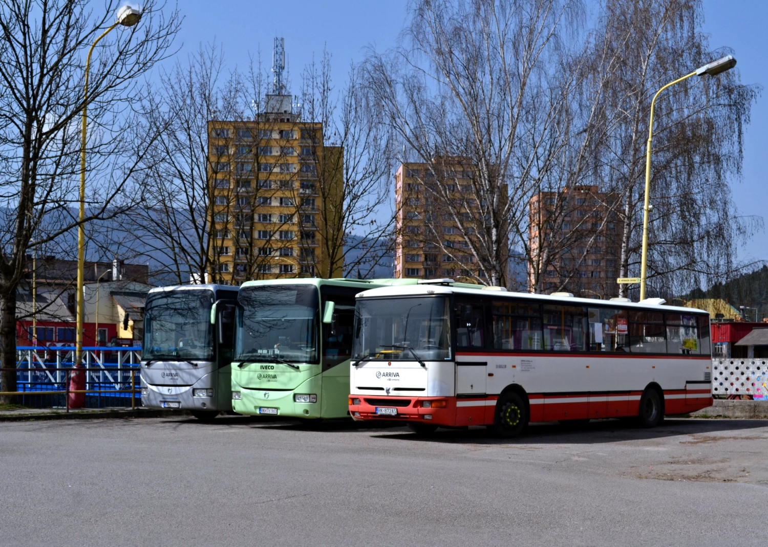 Autobusy na prímestskú a mestskú dopravu v Ružomberku